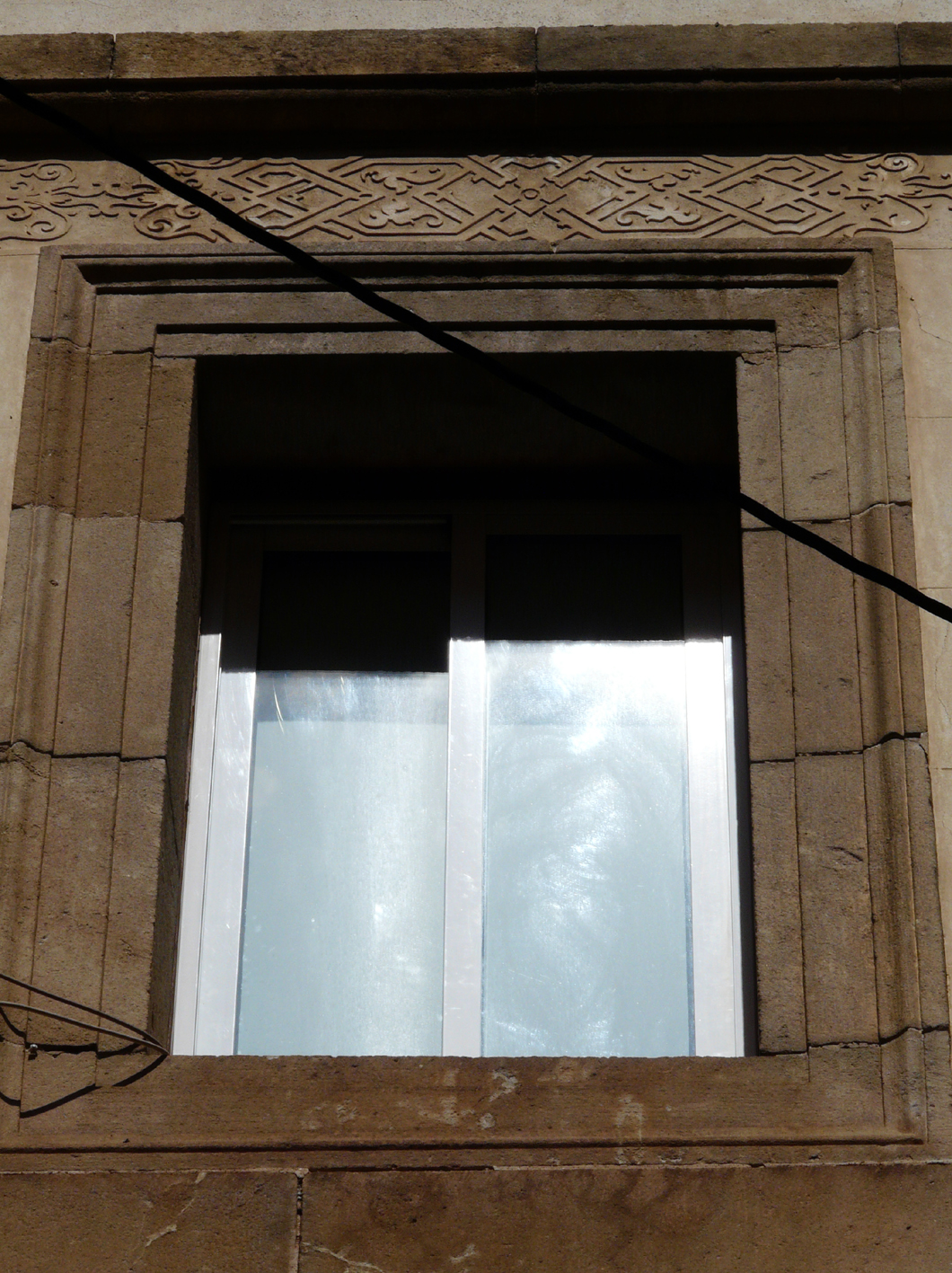 Casa Piera. Sagrat Cor, 4. 08034 Barcelona